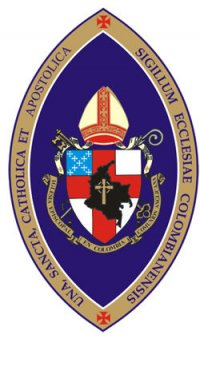 Escudo de la Iglesia Episcopal en Colombia aprobado bajo resoluciòn No. 01 en la 43a. Convencion Diocesana realizada en la Ciudad de Medellin, Antioquia - 2008